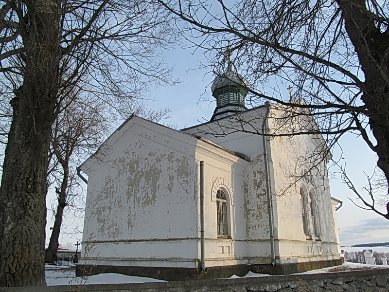 Азярніца. Свята-Мікалаеўская царква